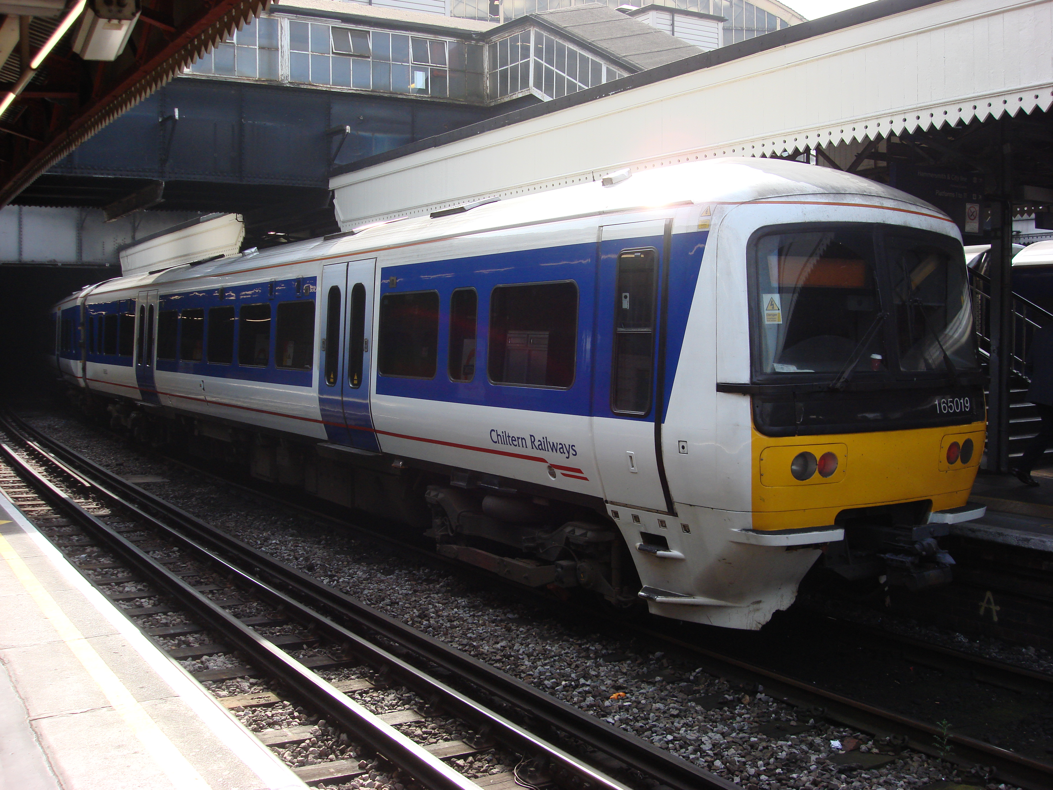 165019 at London Paddington